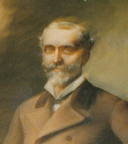 Fotografía del retrato de Francisco Vargas Fontecilla (1824-1883), jurista y político chileno